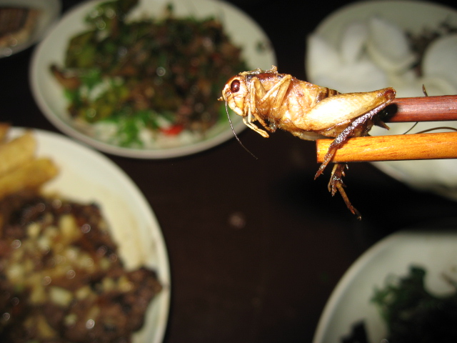 Crunchy...